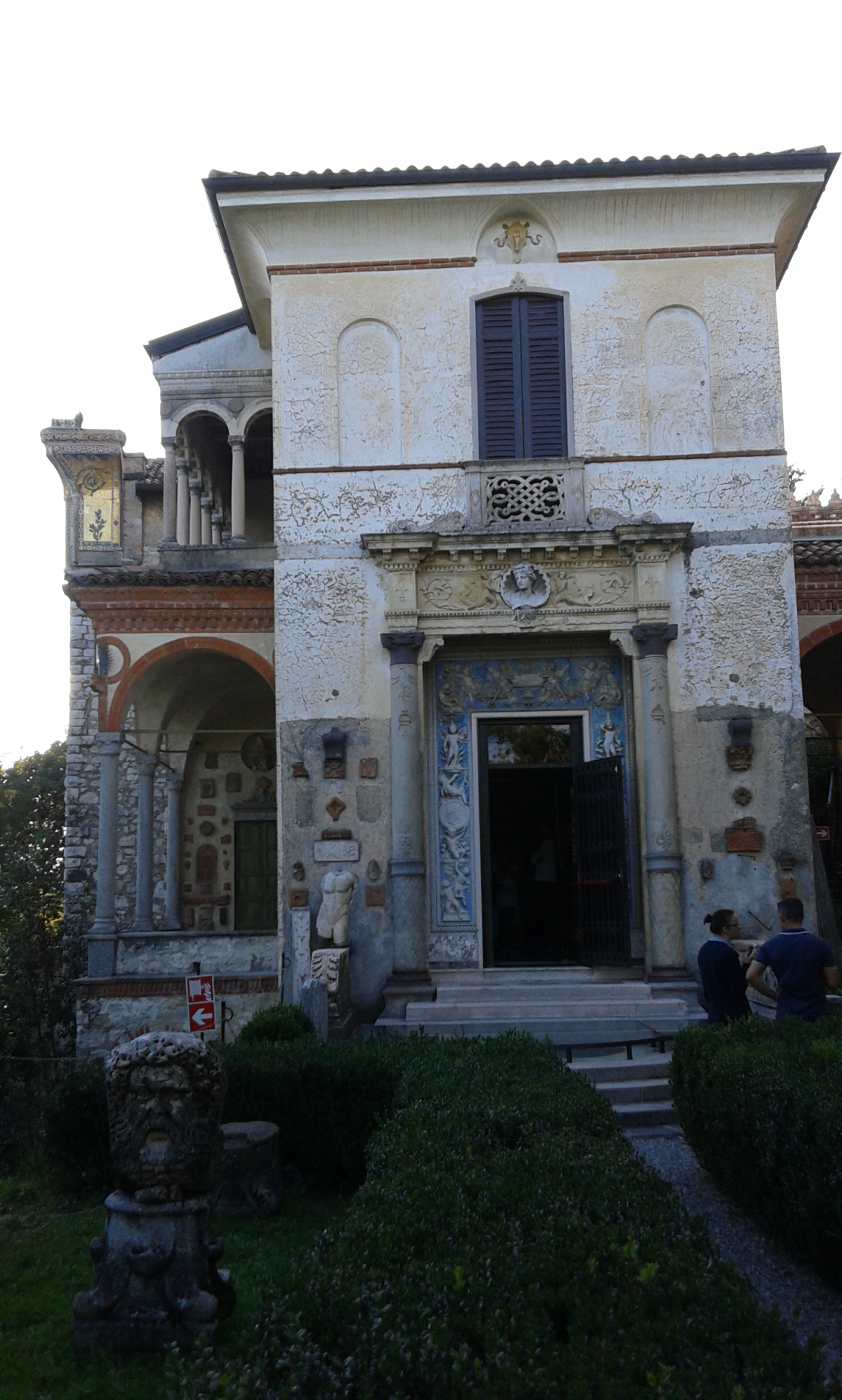 Casa Museo Lodovico Pogliaghi, Santa Maria del Monte, Varese